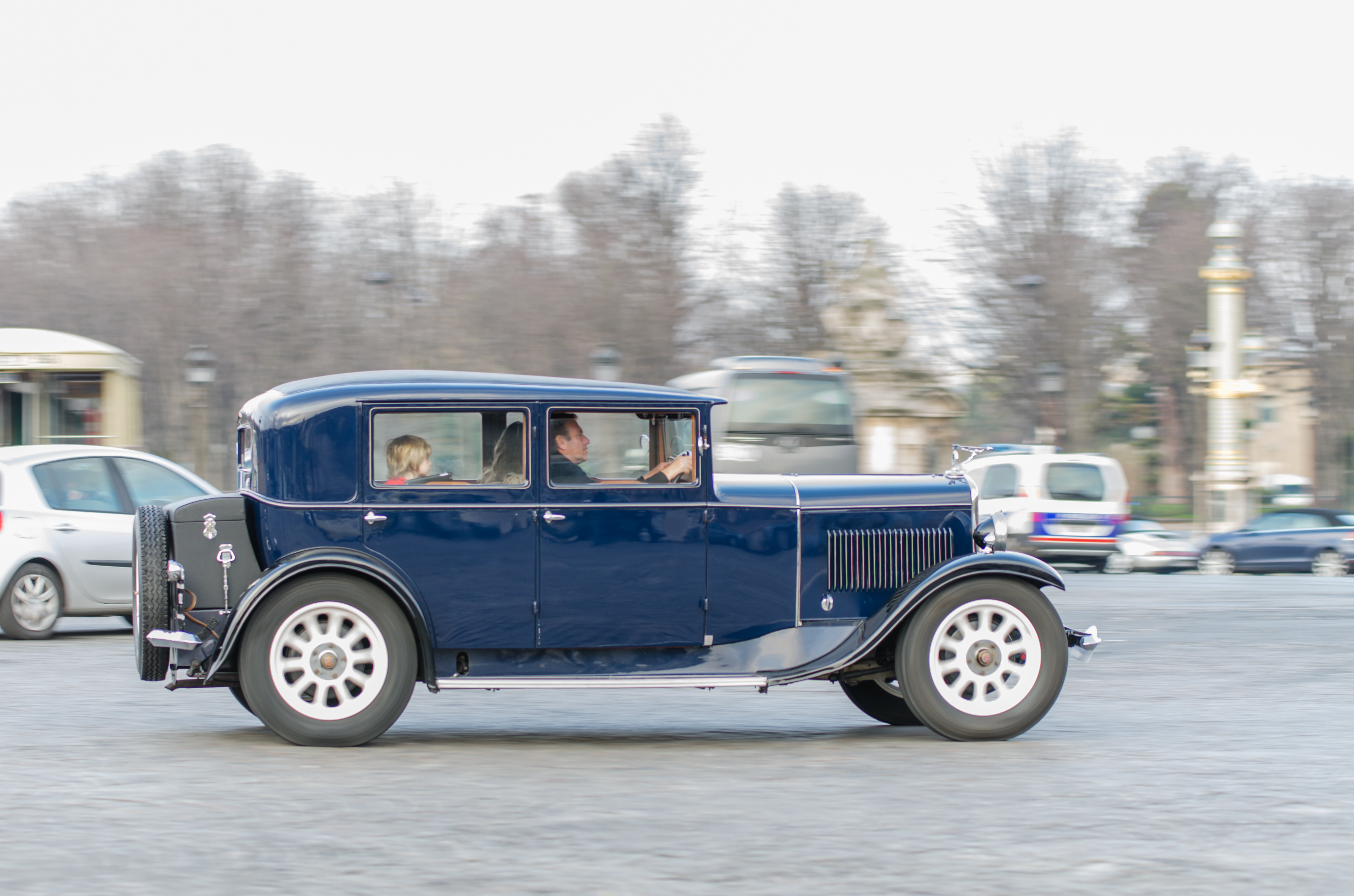 1932 Morris-Léon Bollée Léon Bollée Morris collection Paris